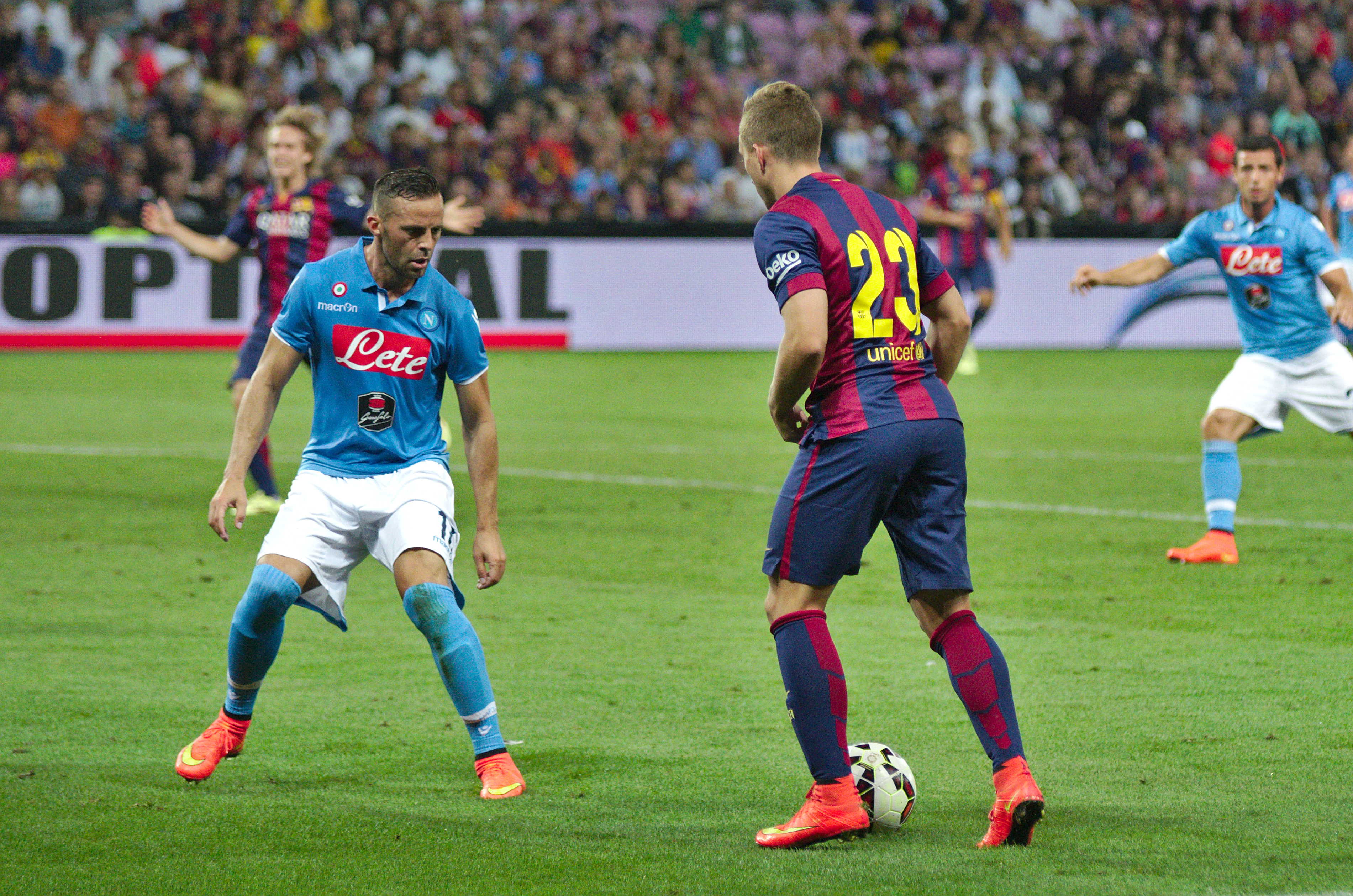 Barça - Napoli - 20140806